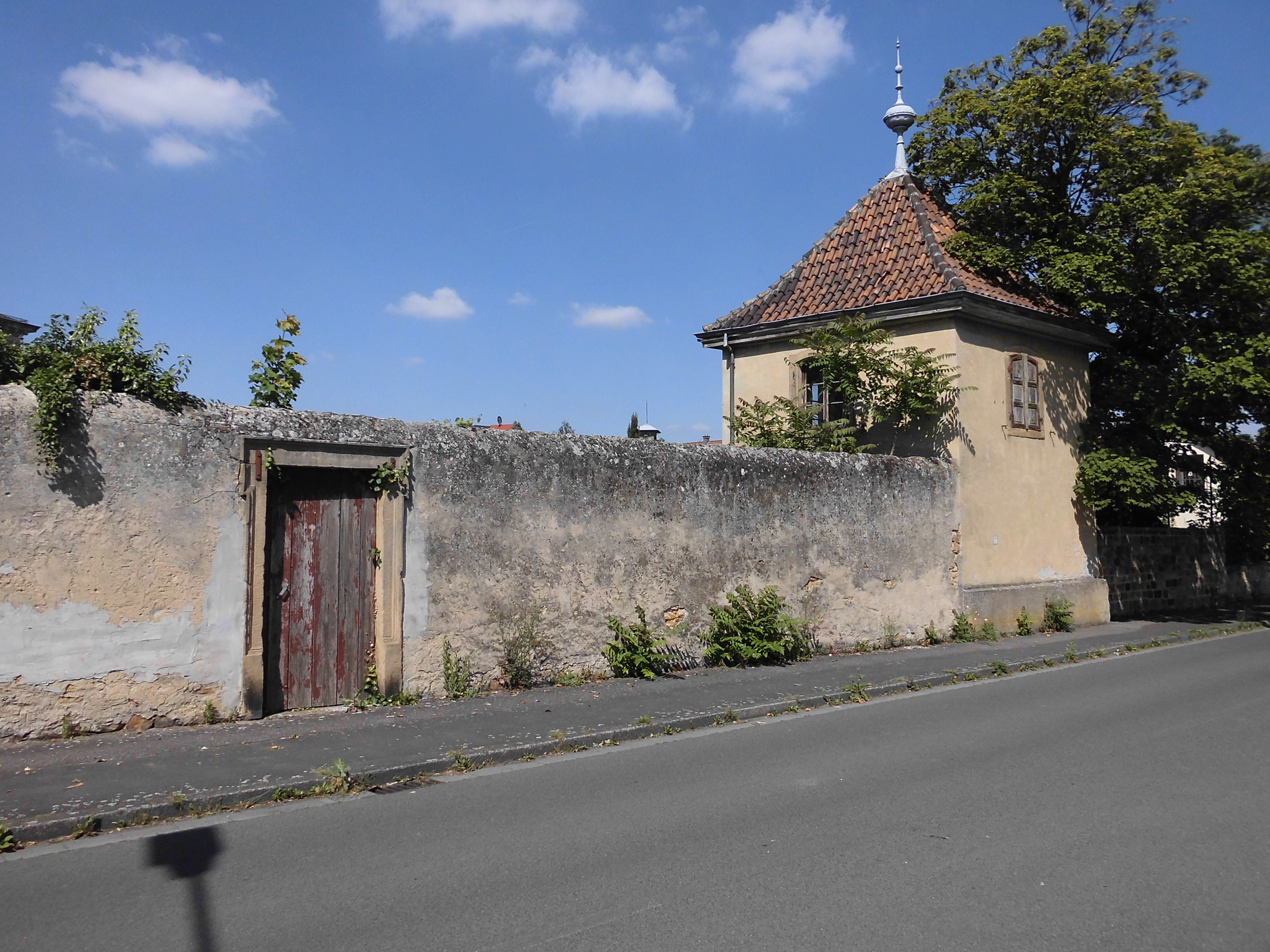 Gartenmauer und Gartenhaus der Winzervilla Weinstraße 5